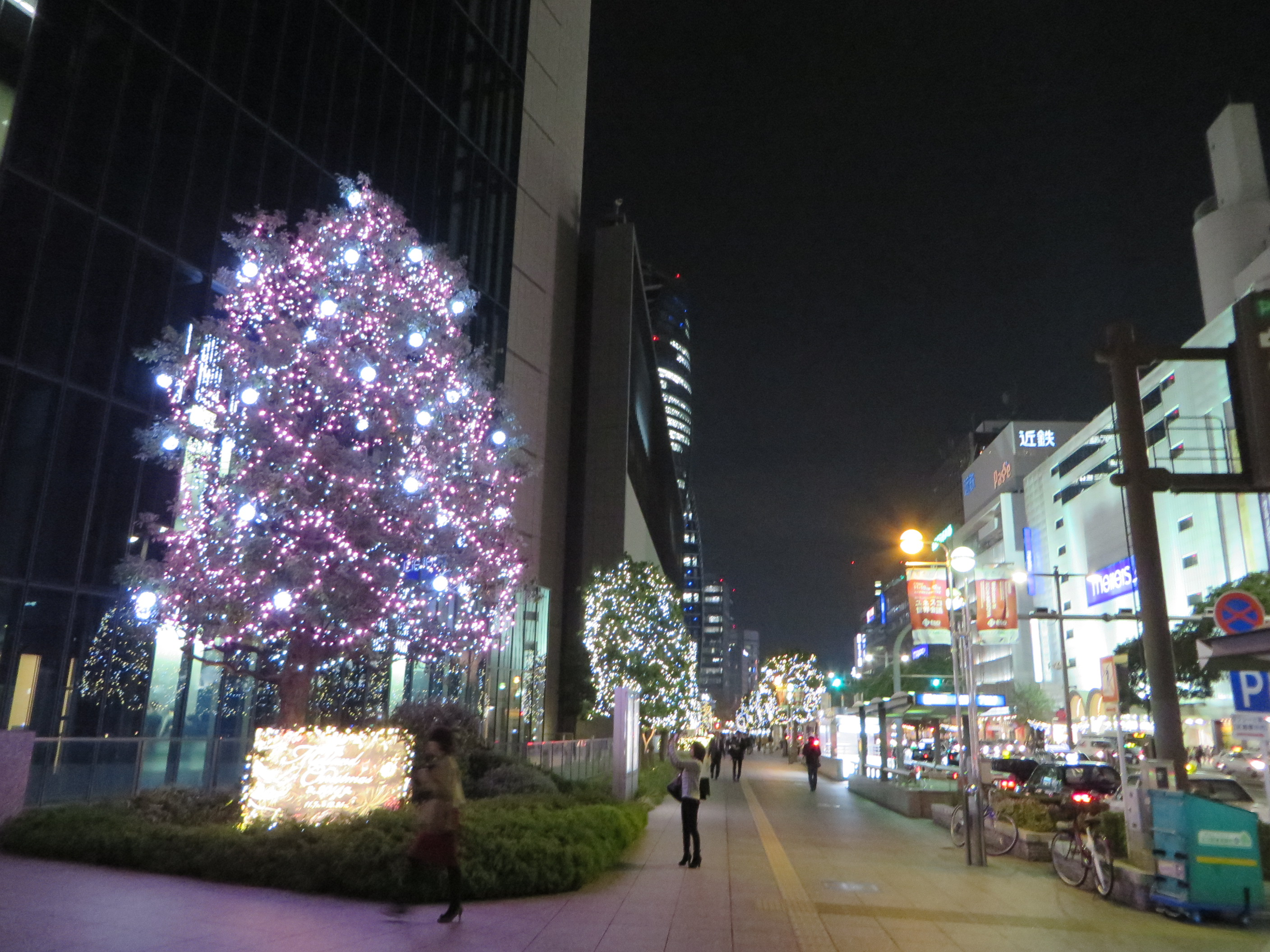 愛知県名古屋市中村区名駅１丁目１